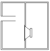 caixa